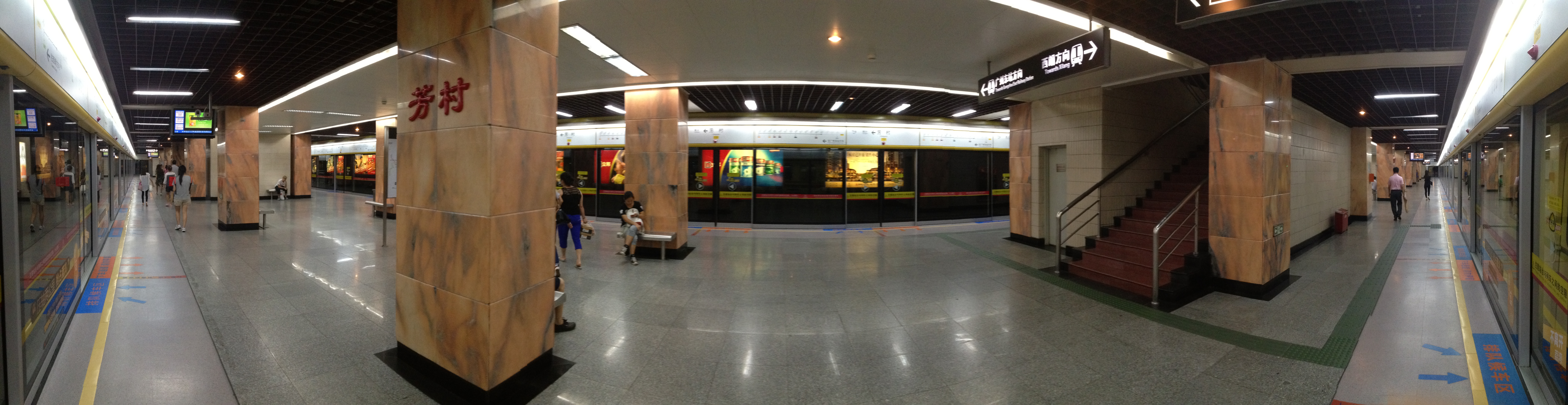 广州地铁芳村站月台全景图